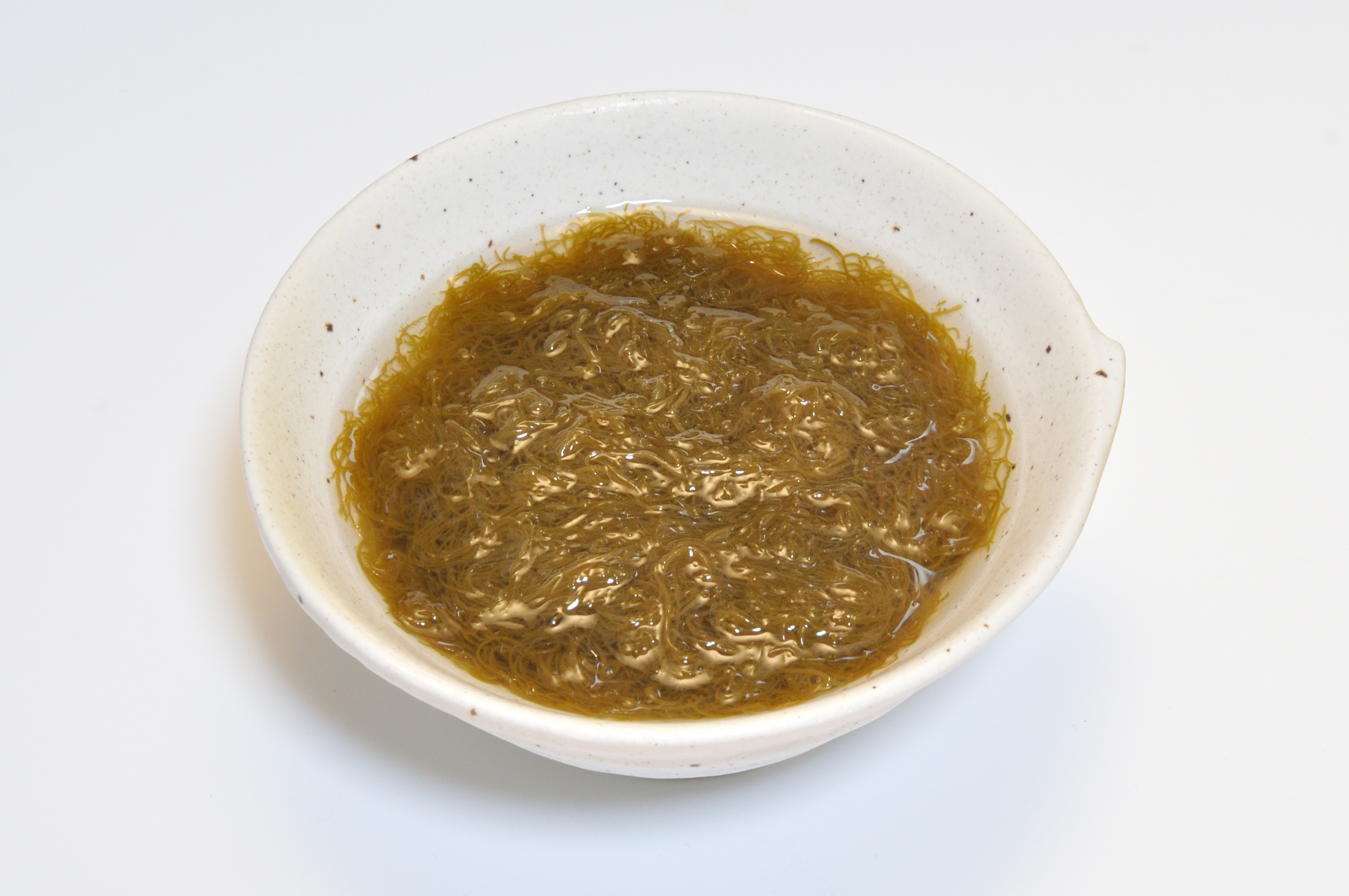 新潟産の花もずく